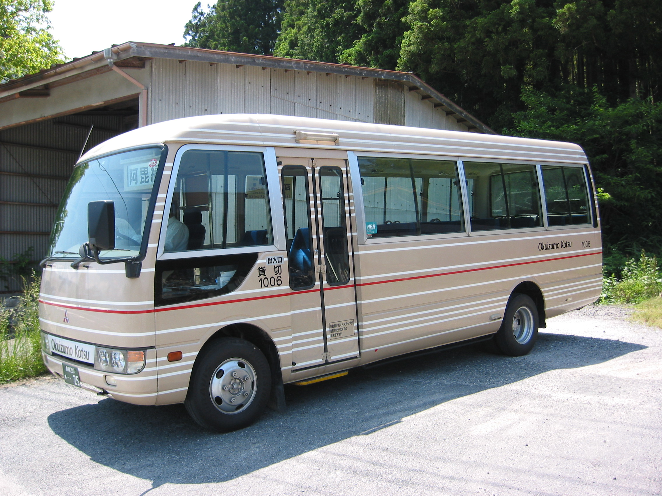 奥出雲交通（島根県） 乗合バスの車両